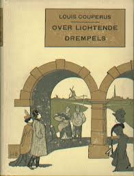 Tekening van Joh. Braakensiek Amsterdam, 24 mei 1858 – aldaar, 27 februari 1940)